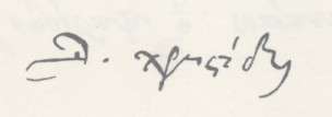 Η υπογραφή του Δημητρίου Χρηστίδη.